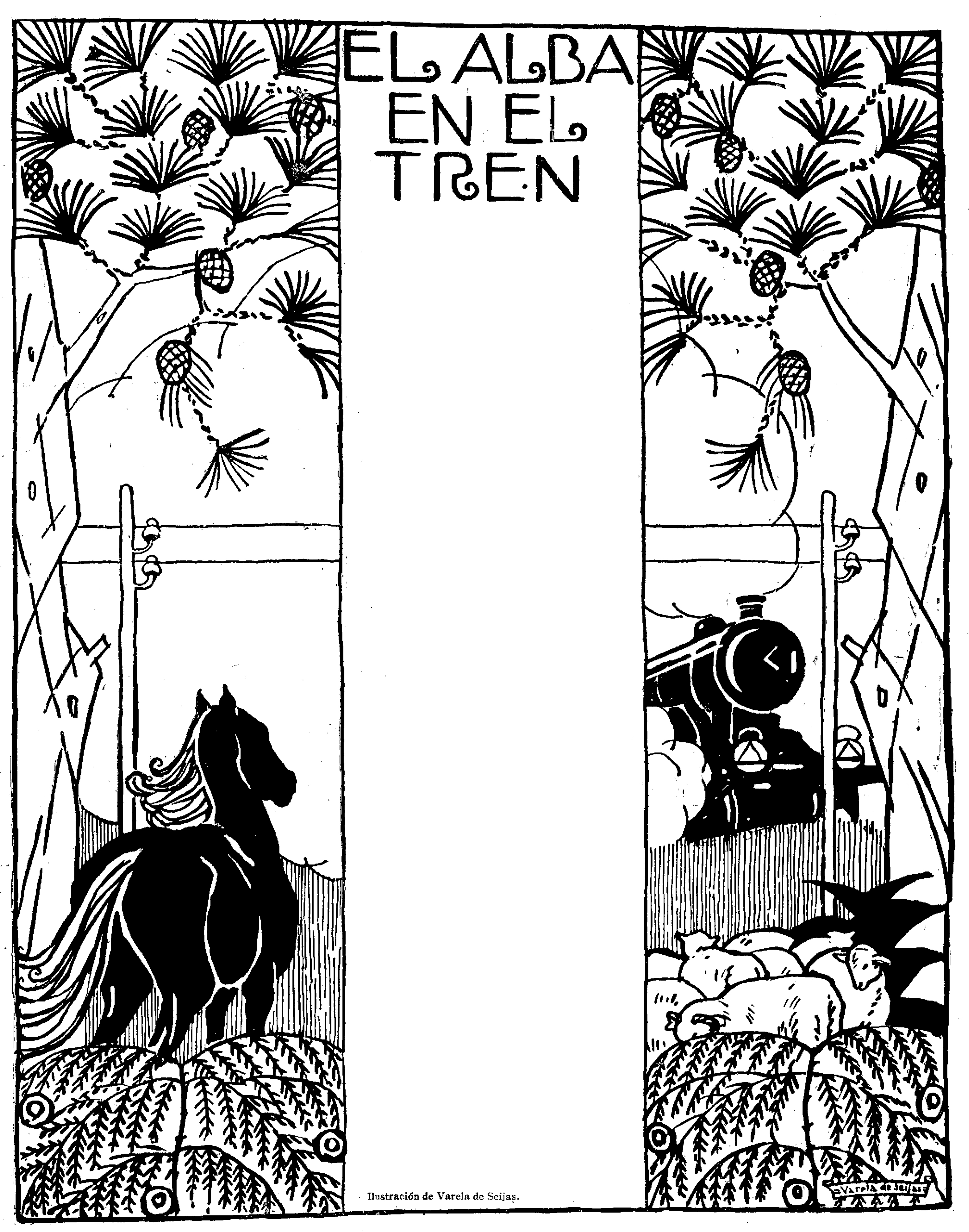 El alba en el tren.